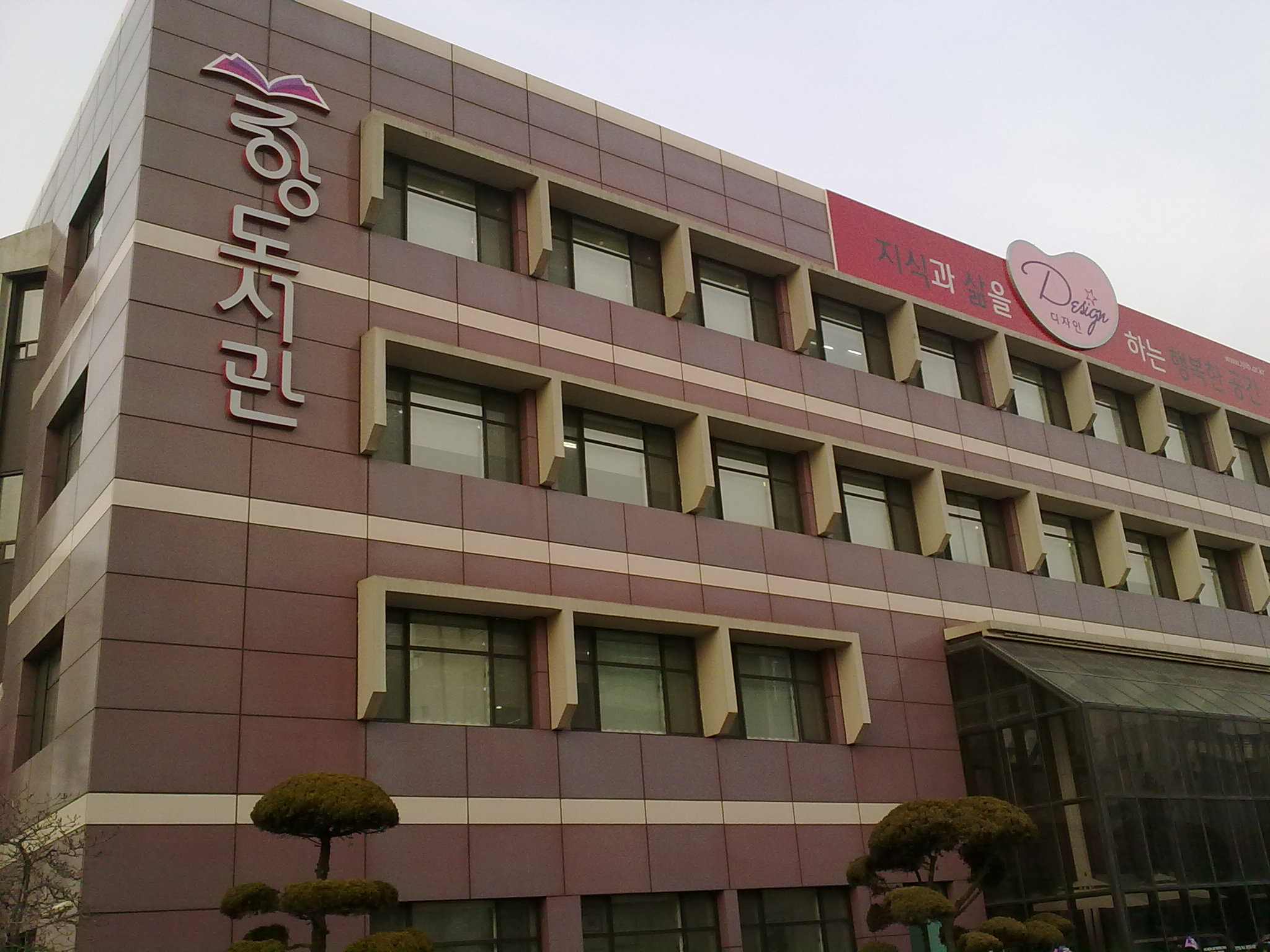 인천광역시 중앙도서관의 전경